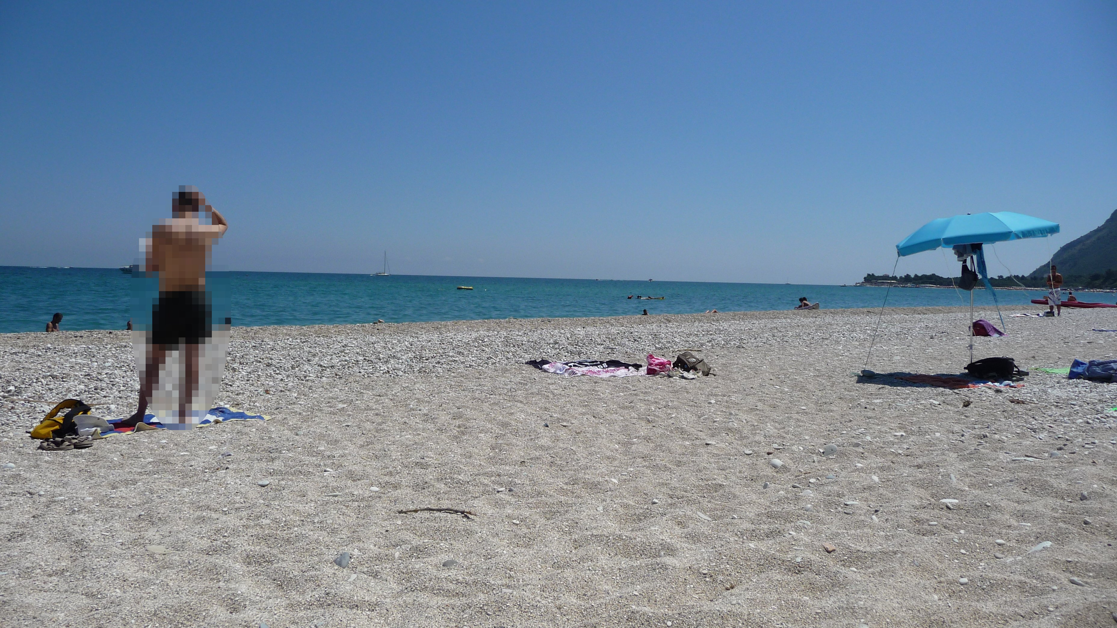 Spiaggia di Mezzavalle, Comune di Ancona, Italia